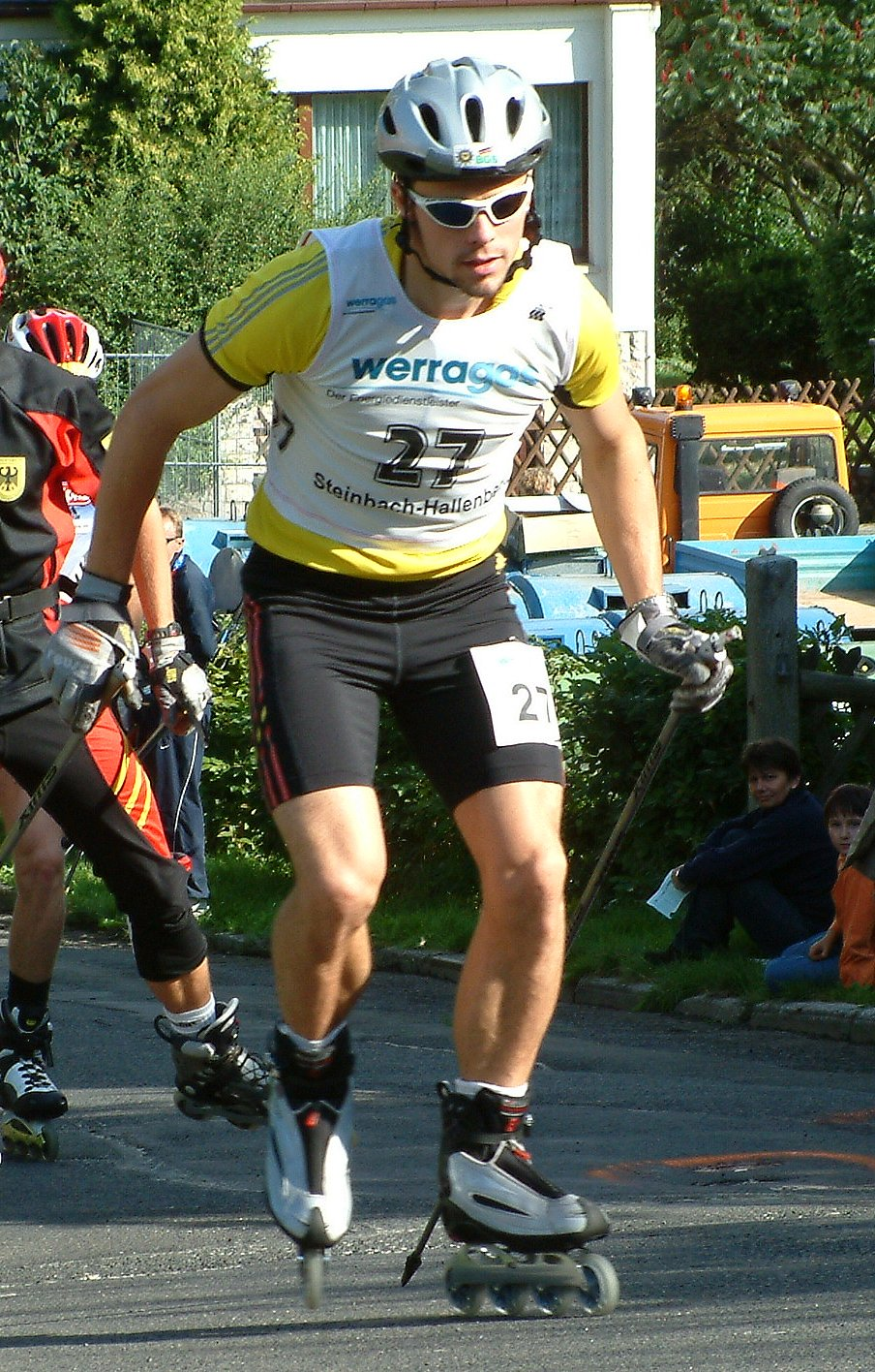 Sebastian Haseney during the Sommer Grand Prix in Steinbach-Hallenberg